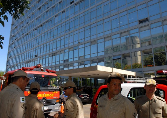 Bombeiros entram no Ministério da Cultura após receber denúncia anônima de bomba.